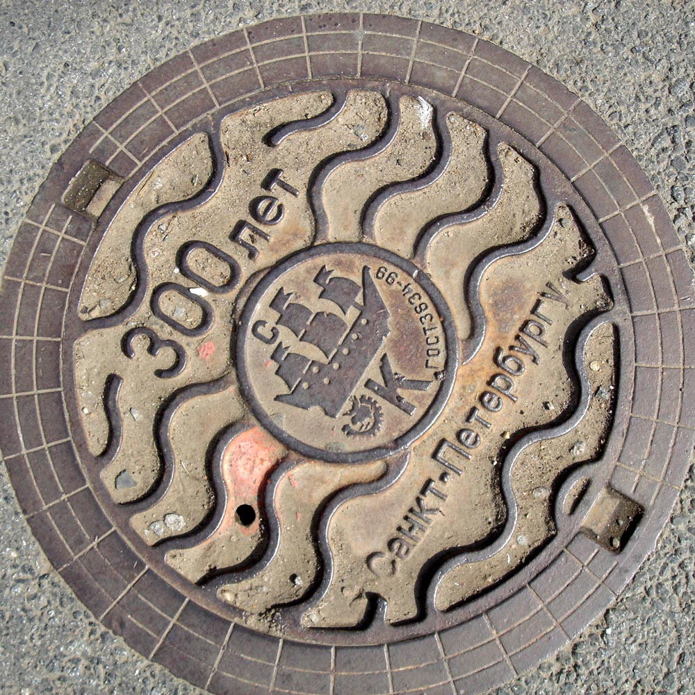 Люк "Канализация", Санкт-Петербургу 300 лет